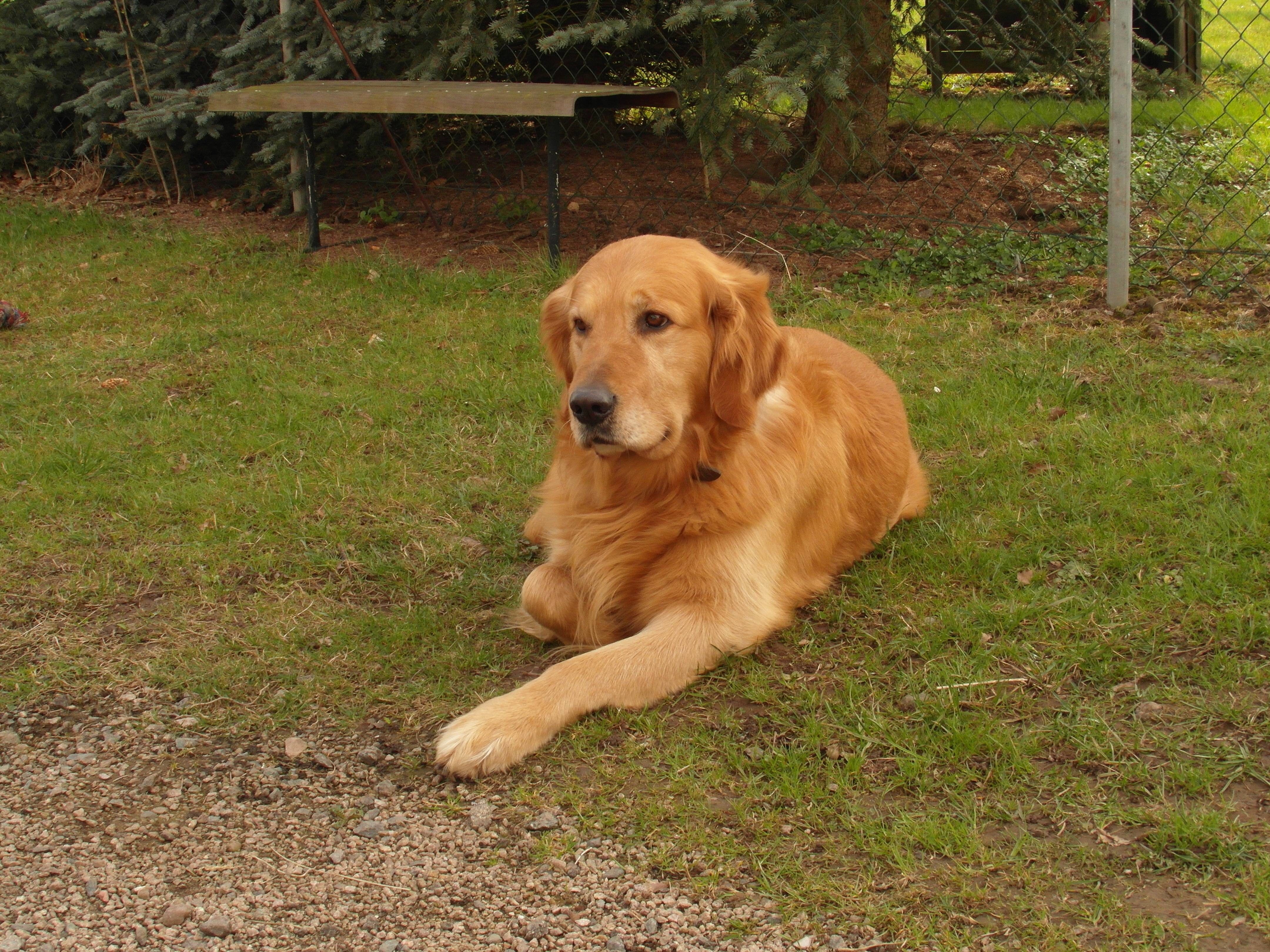 A Golden Retriever lying on grass.